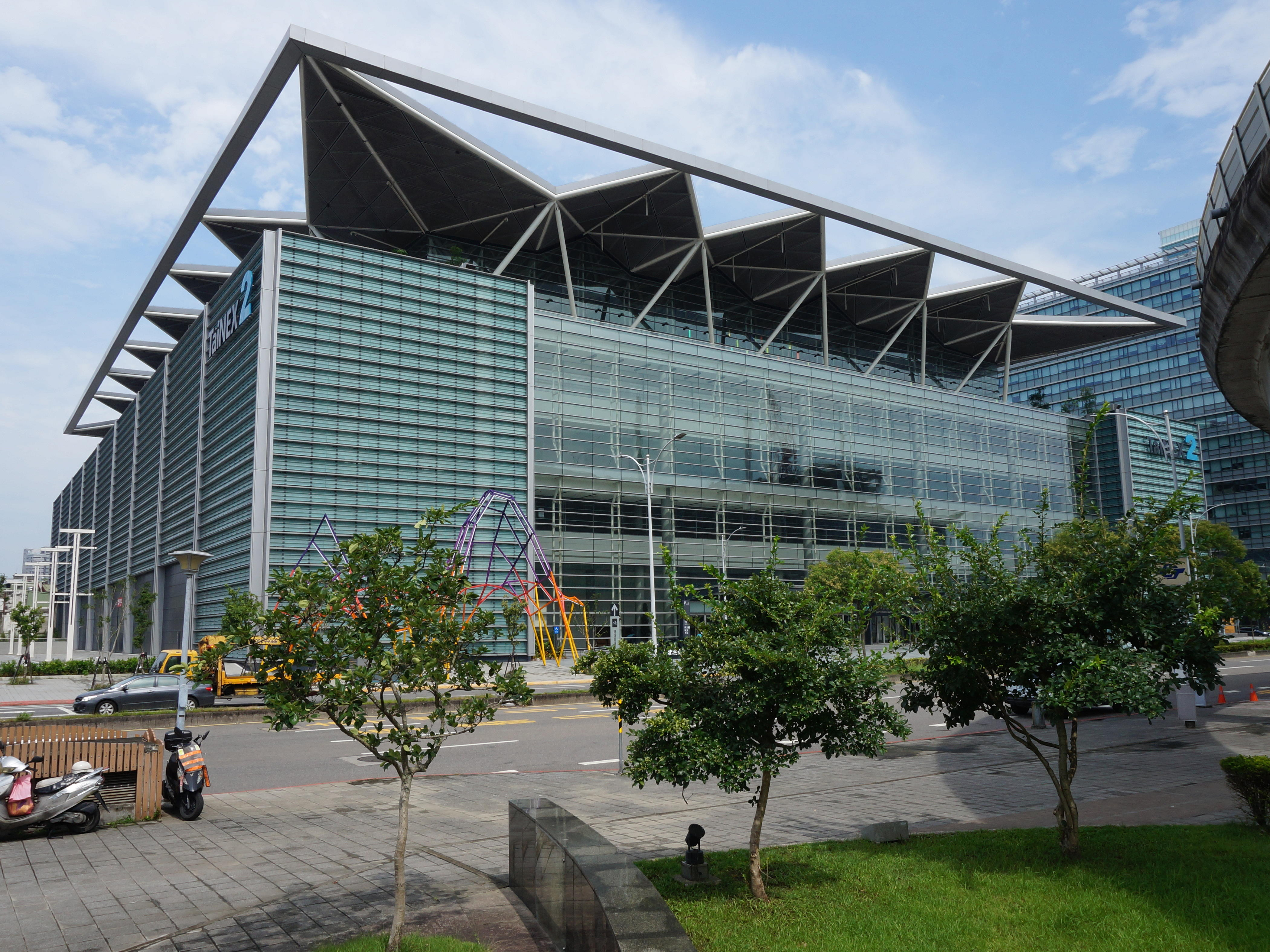 台北南港展覽館2館。